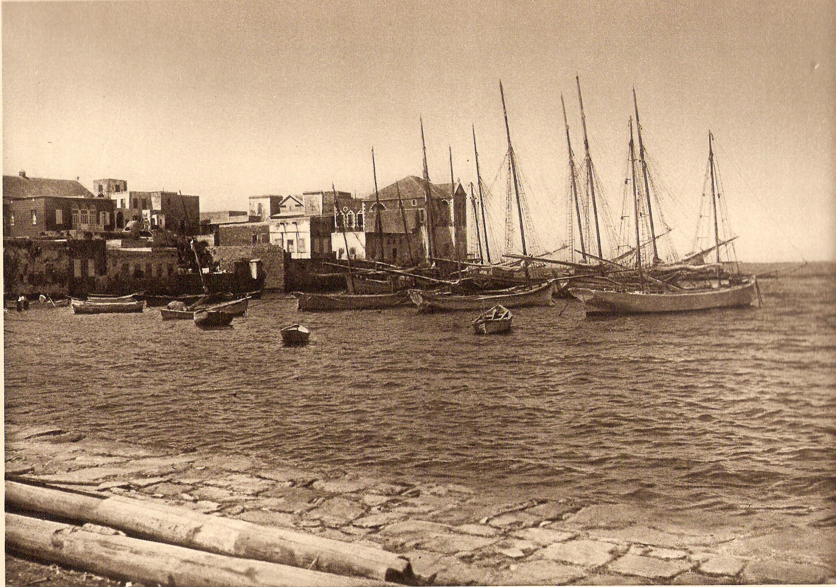 נמל צור